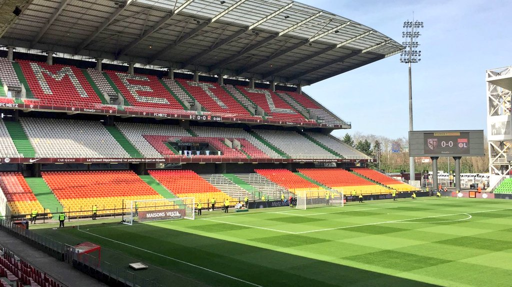 Tribune Ouest de Saint-Symphorien